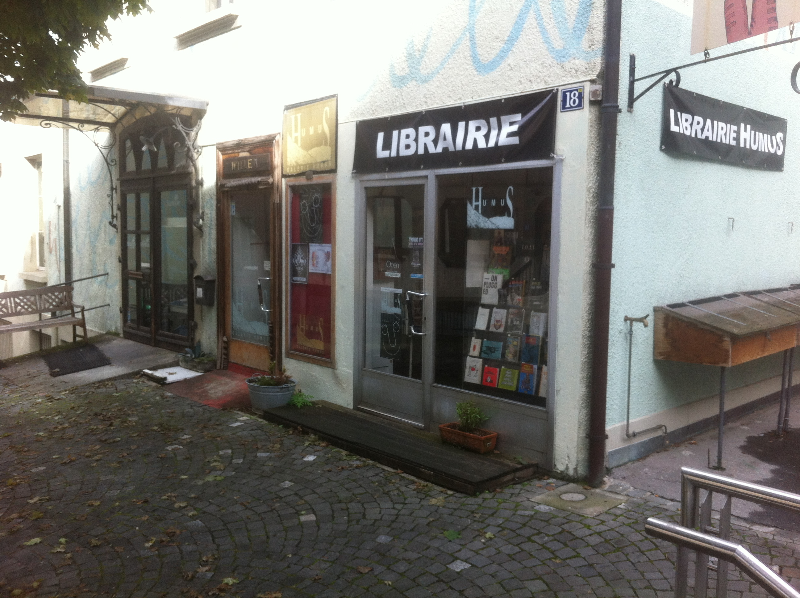 Façade de la librairie HumuS